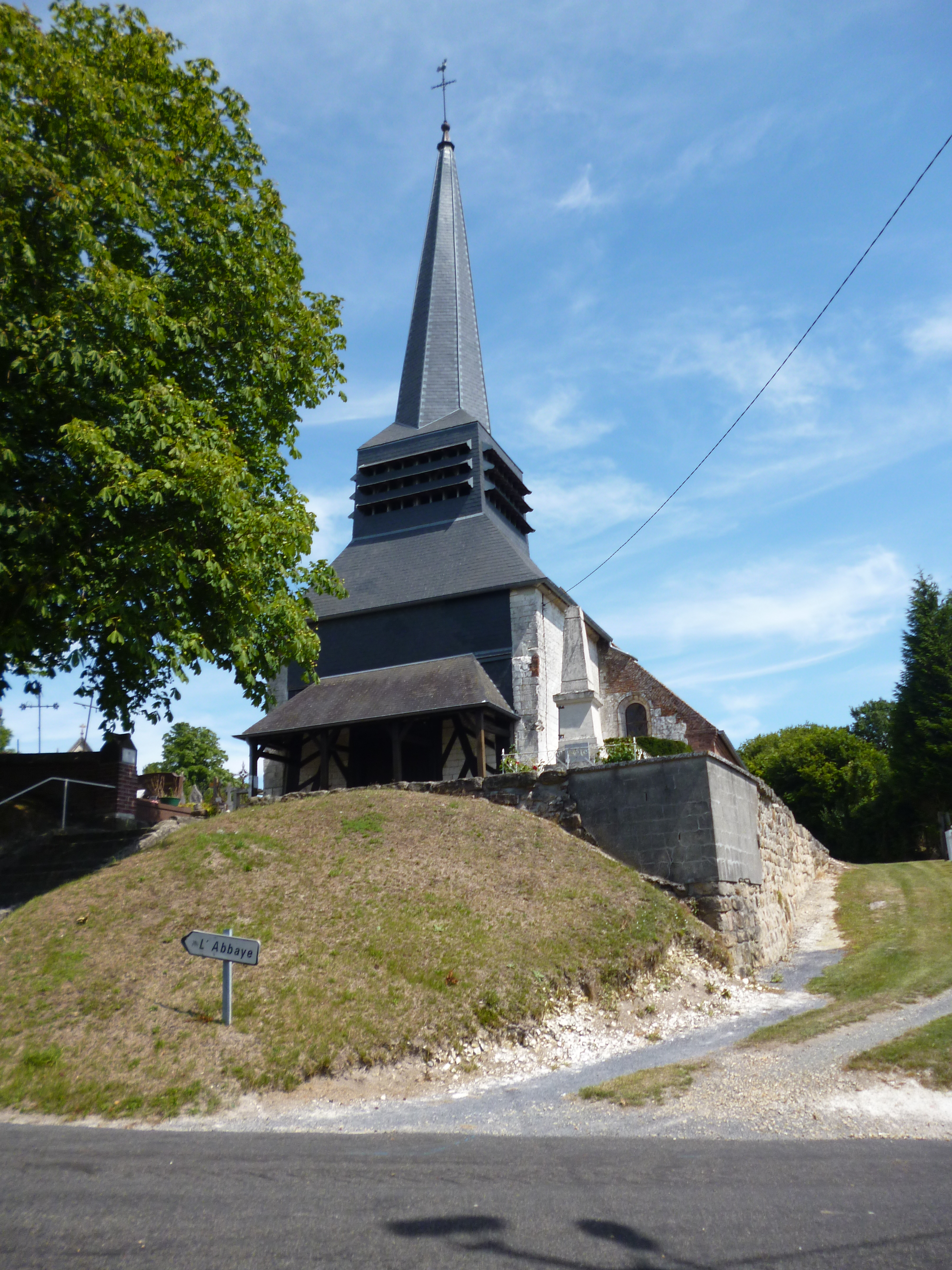 Eglise Saint-Nicolas de la commune de La Hérelle (Oise).